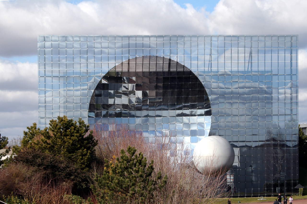 Batiment du Futuroscope